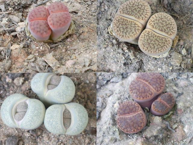 Foto tirada de coleção particular.